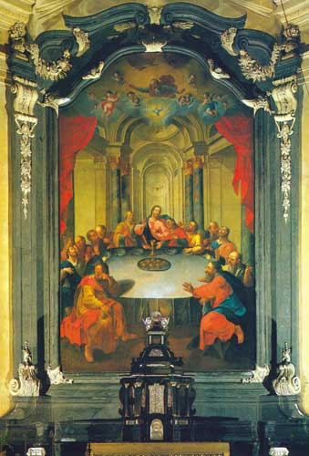 Aбраз Апошняя Вячэра 1753 г., з галоўнага алтара Нясвіжскага фарнага касцёла Божага Цела